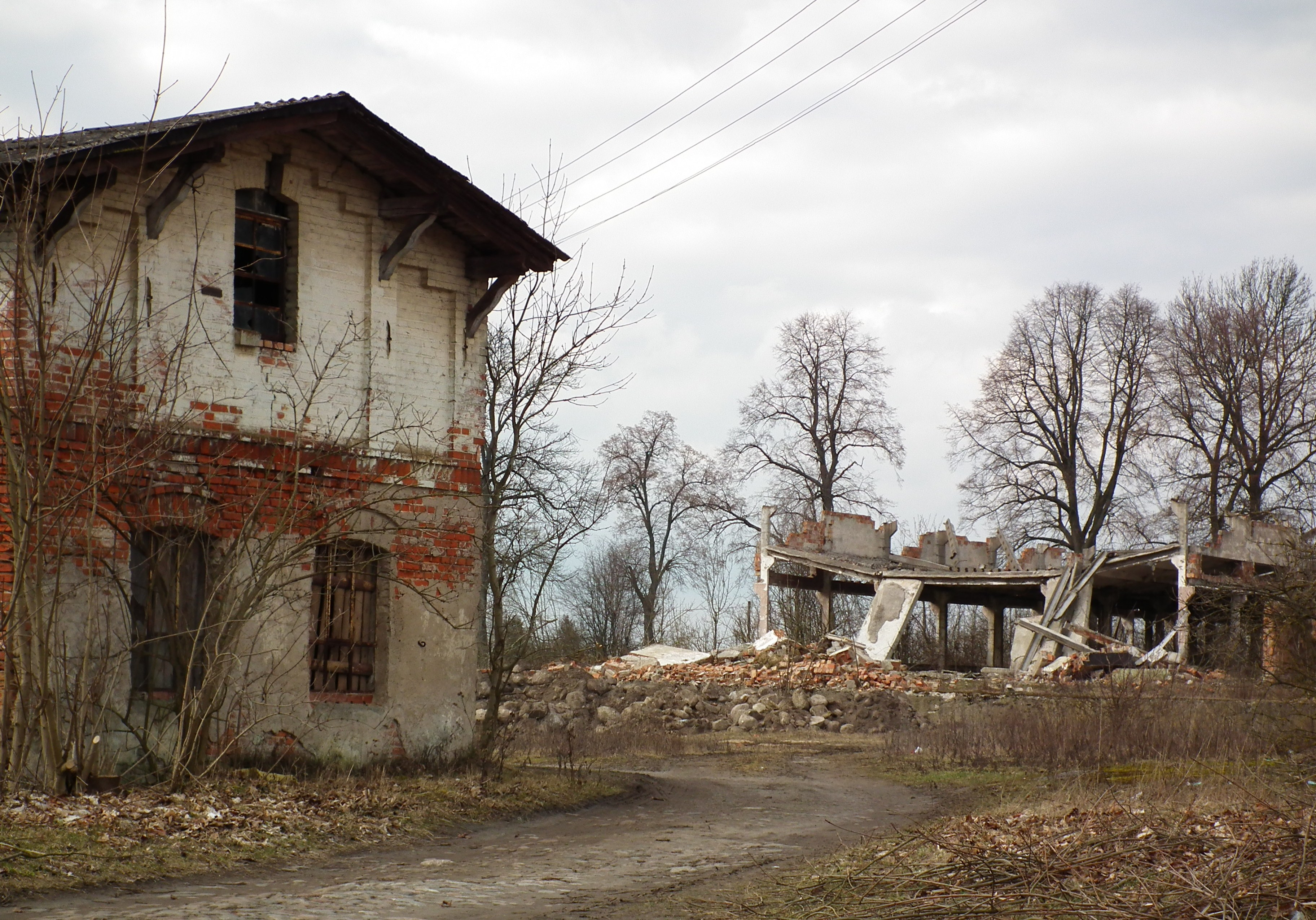 Ruiny PGR-u w Węgorzewie Szczecineckim.